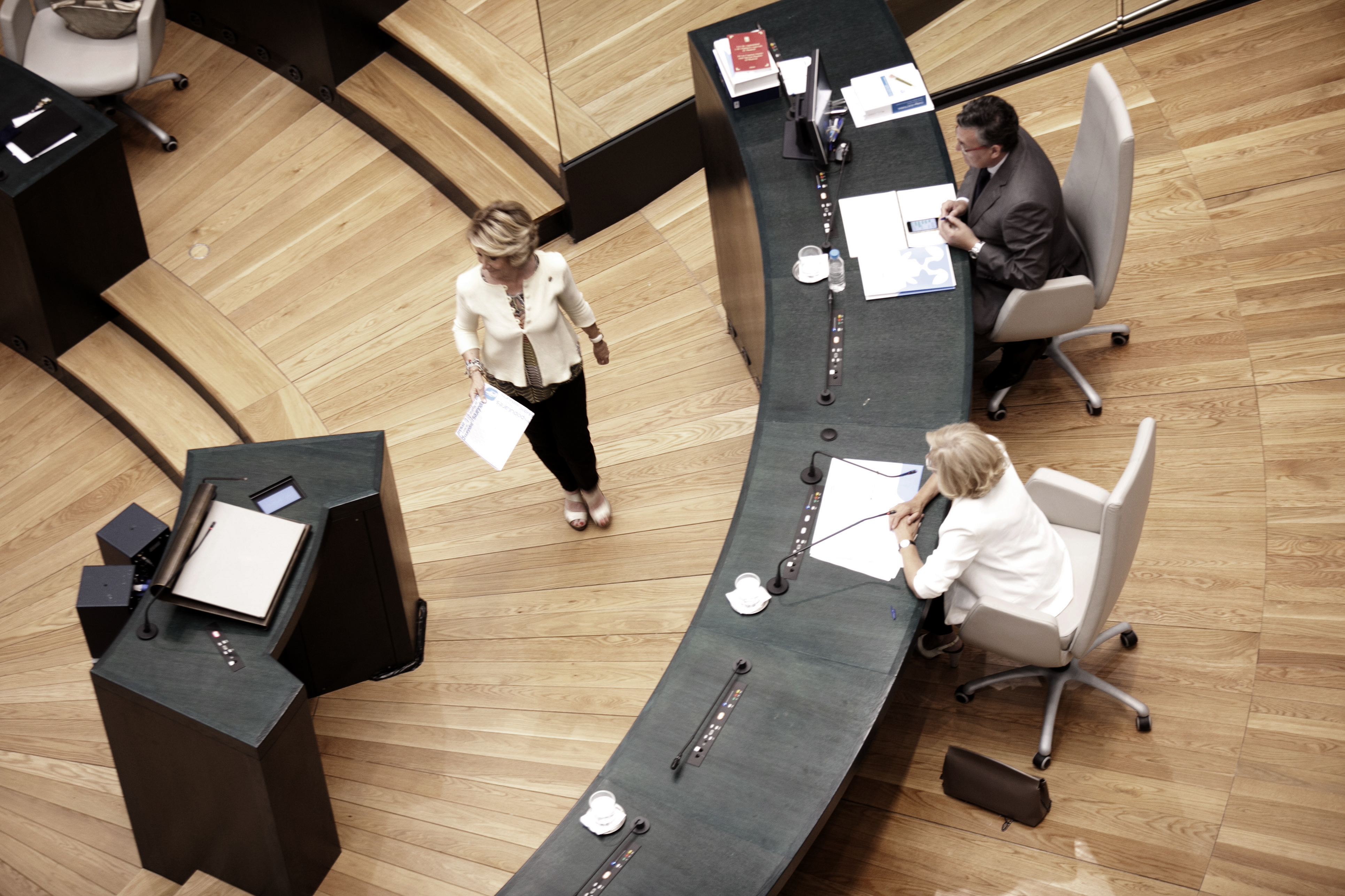 Investidura Manuela Carmena como alcaldesa Madrid